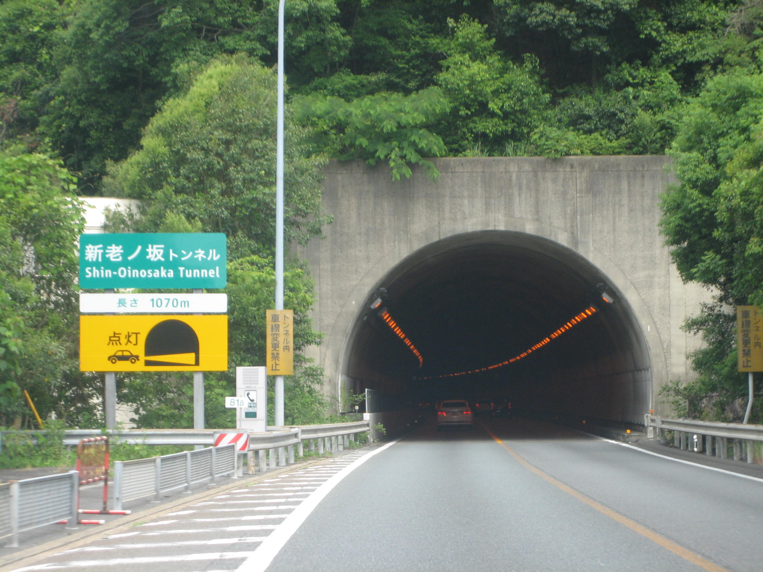 新甥の坂トンネル